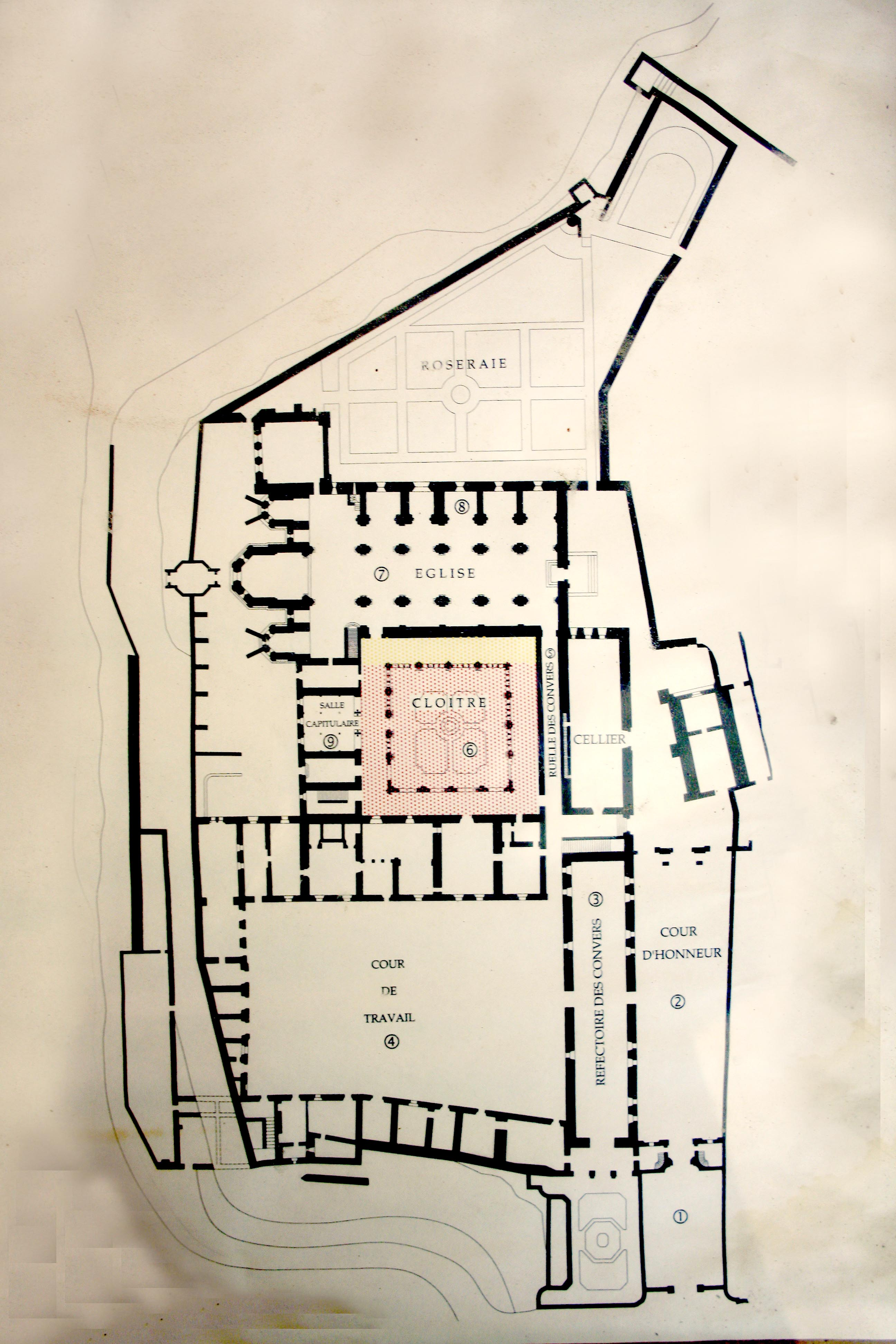 Plano de las depenencias de la Abadia de Fontfroide (Fonrfreda)